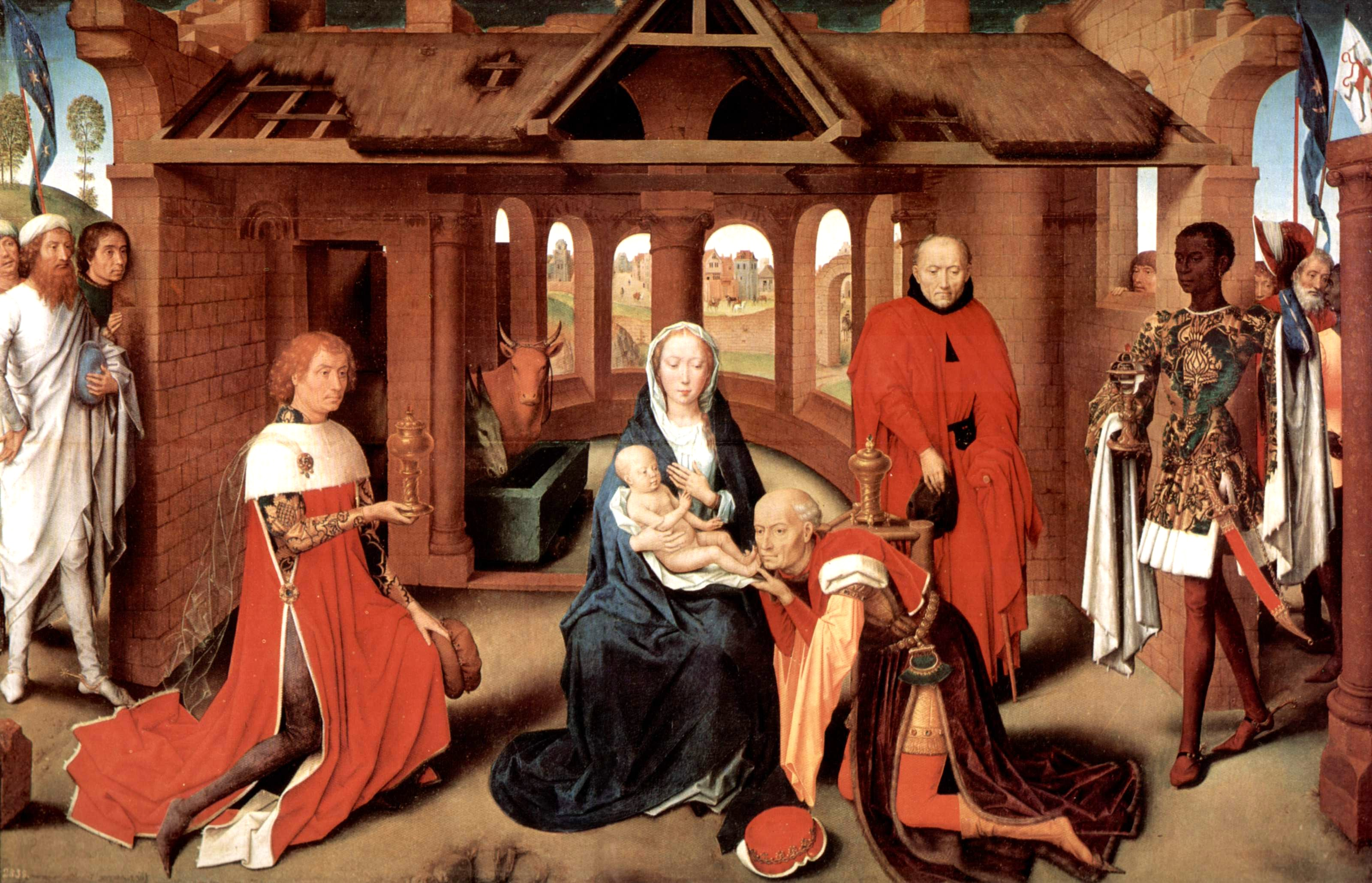 Dreikönigsaltar central panel